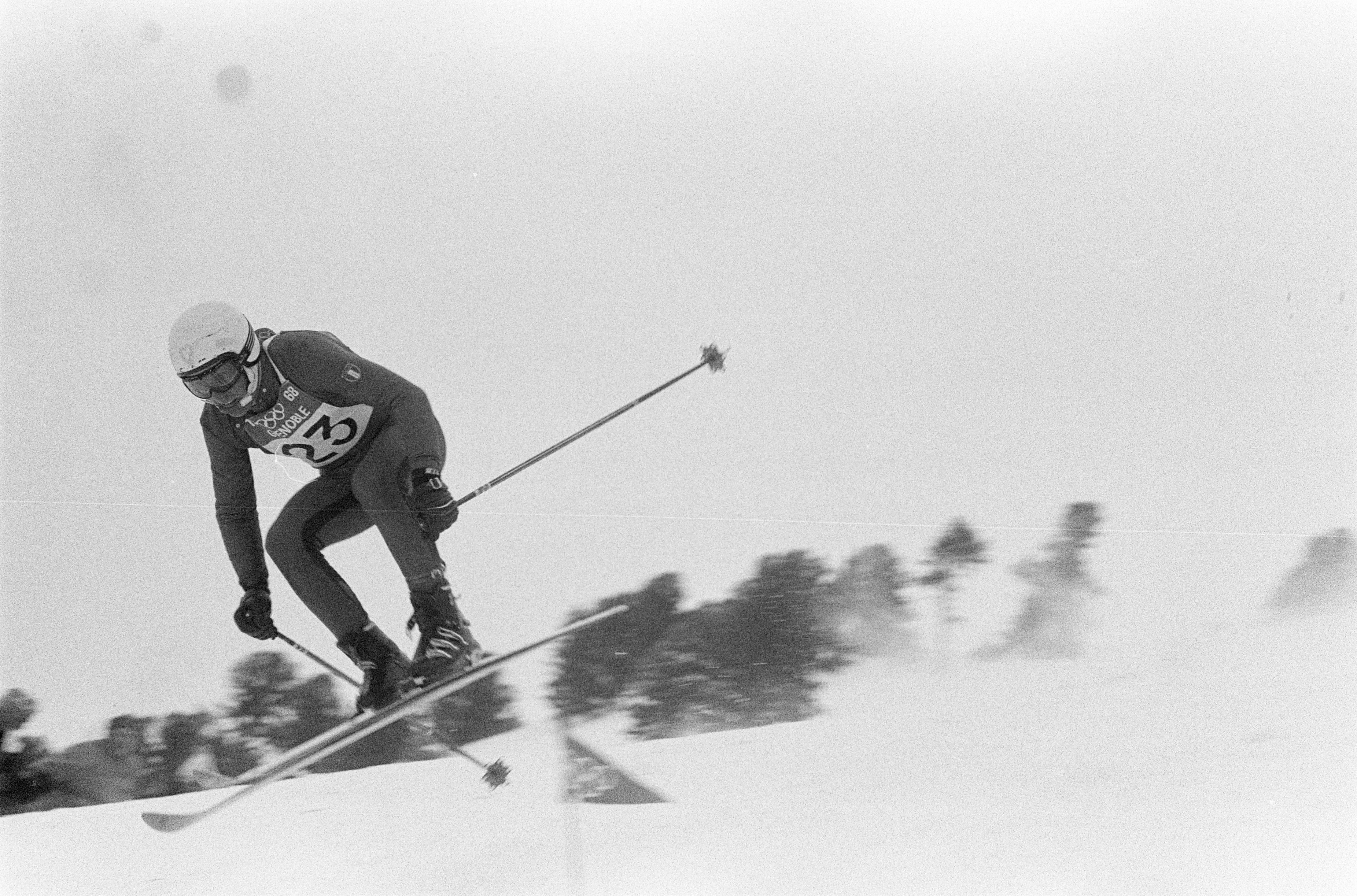 Collectie / Archief : Fotocollectie Anefo Reportage / Serie : [ onbekend ] Beschrijving : Olympische spelen, nummer 23 Teresio Vachet (It), nummer 24 Bjorne Strand (N) Datum : 7 februari 1968 Trefwoorden : skien Fotograaf : Kroon, Ron / Anefo Auteursrechthebbende : Nationaal Archief Materiaalsoort : Negatief (zwart/wit) Nummer archiefinventaris : bekijk toegang 2.24.01.05 Bestanddeelnummer : 921-0661